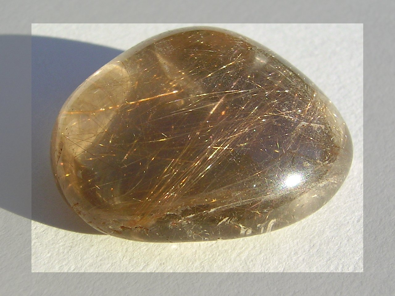 Rutilquarz